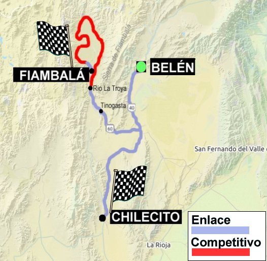 Dakar Rally 2018. Mapa de Etapa 11. Belén-Fiambalá.